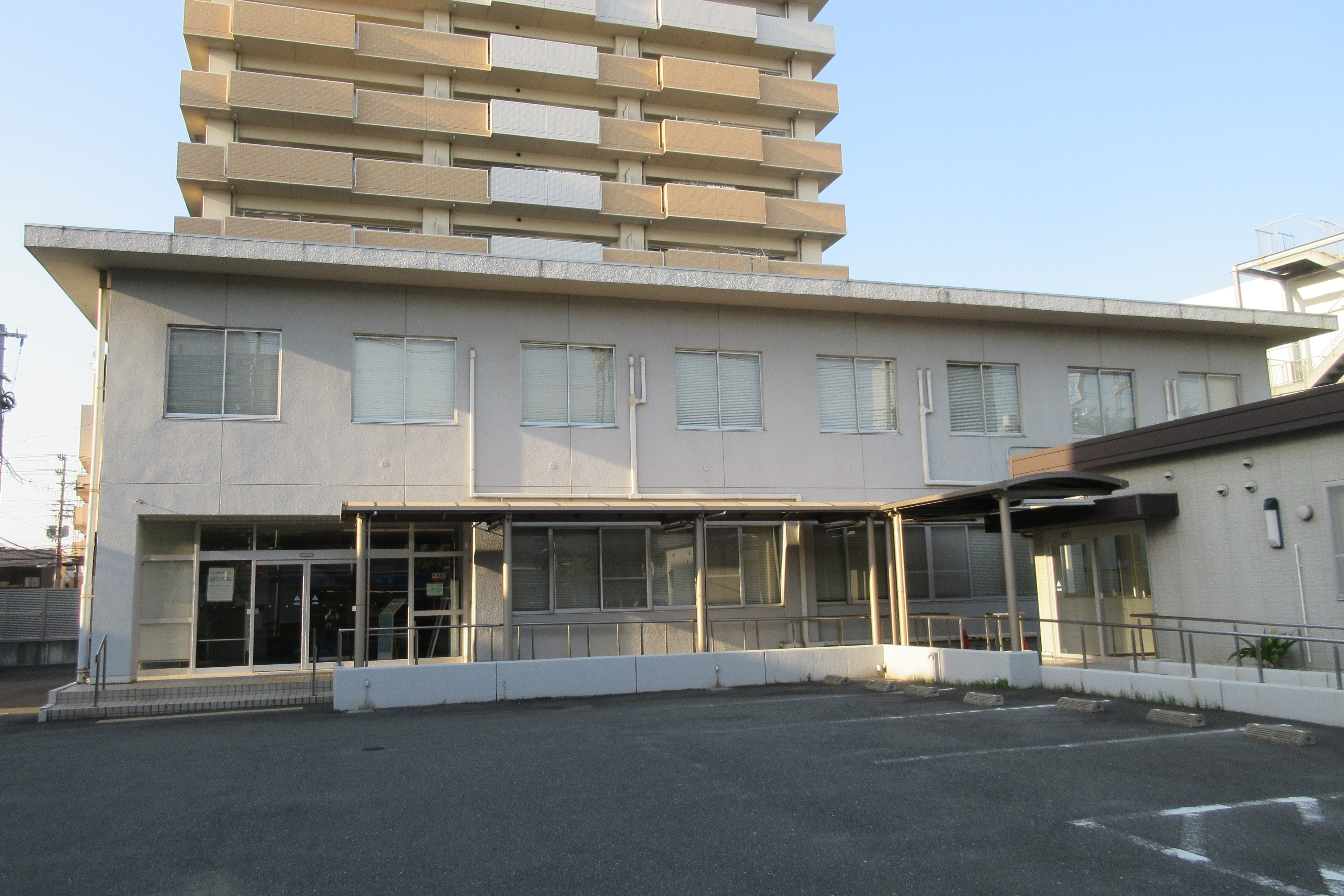 東大阪簡易裁判所